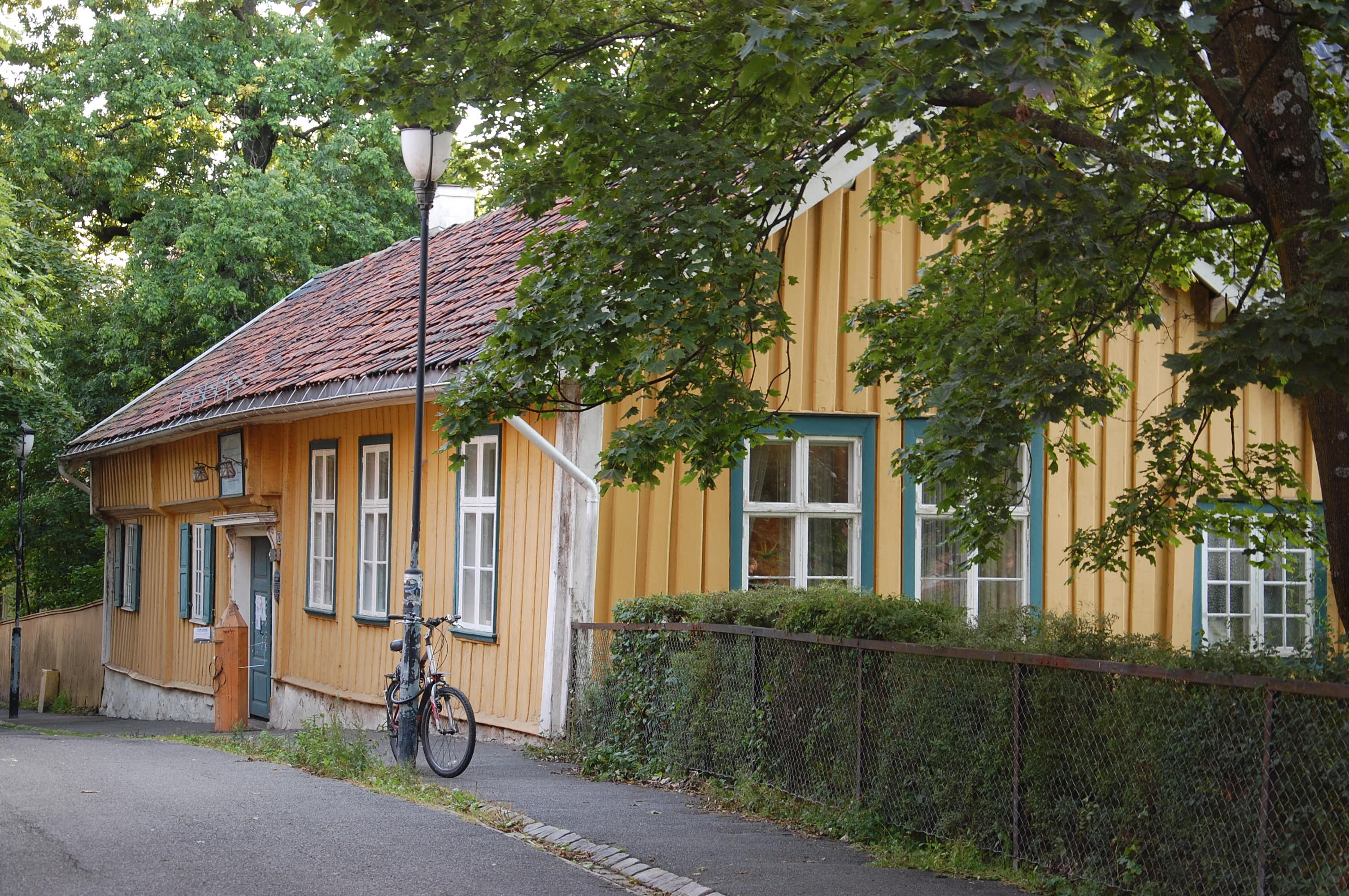 Biermannsgården